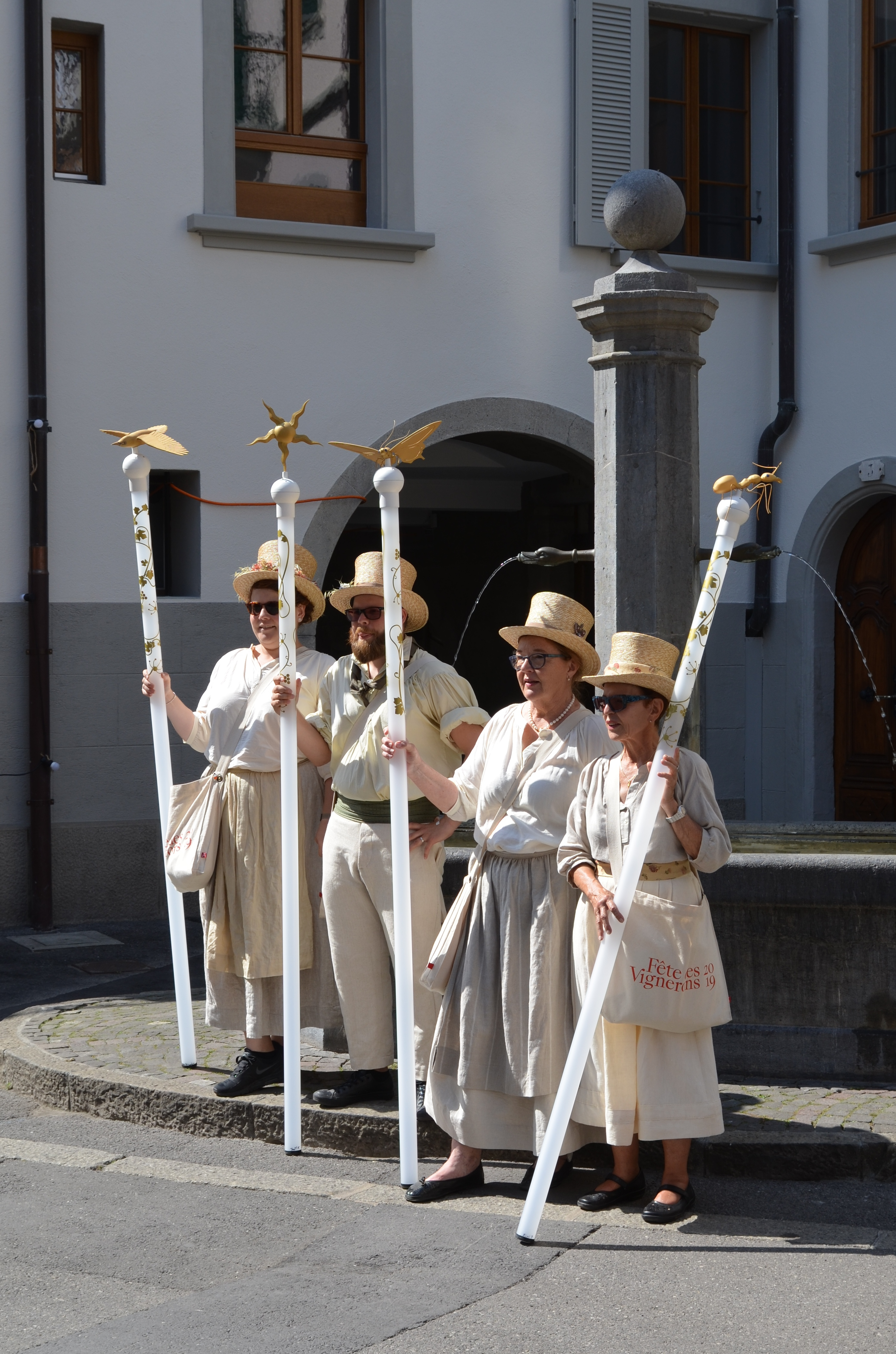 Vevey (Vaud-Suisse) - Marmousets de la fête des Vignerons de 2019.